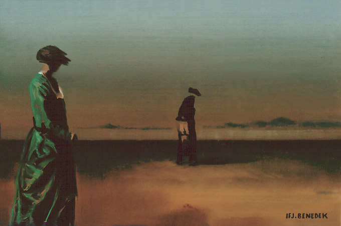 Benedek Jenő, ifj. (Csongrád, 1939. június 13.– 2019. augusztus 20.) festőművész alkotása: Távolodás, 1998, olajfestmény, 30x43 cm